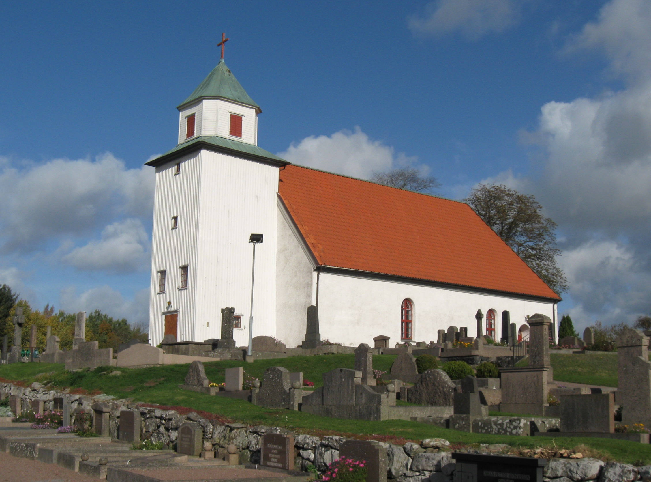 Romelanda kyrka sedd från sydväst